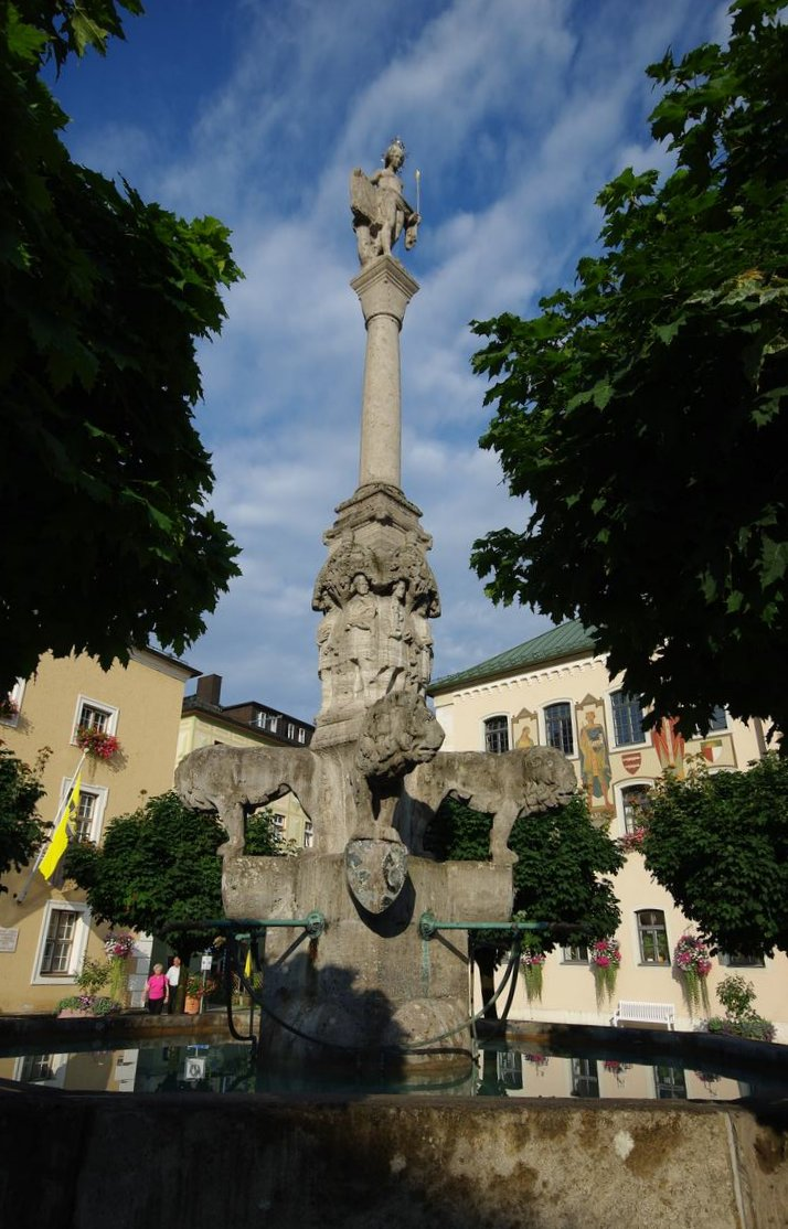 Wittelsbacherbrunnen, Rathausplatz, Bad ReichenhallThis is a photograph of an architectural monument.